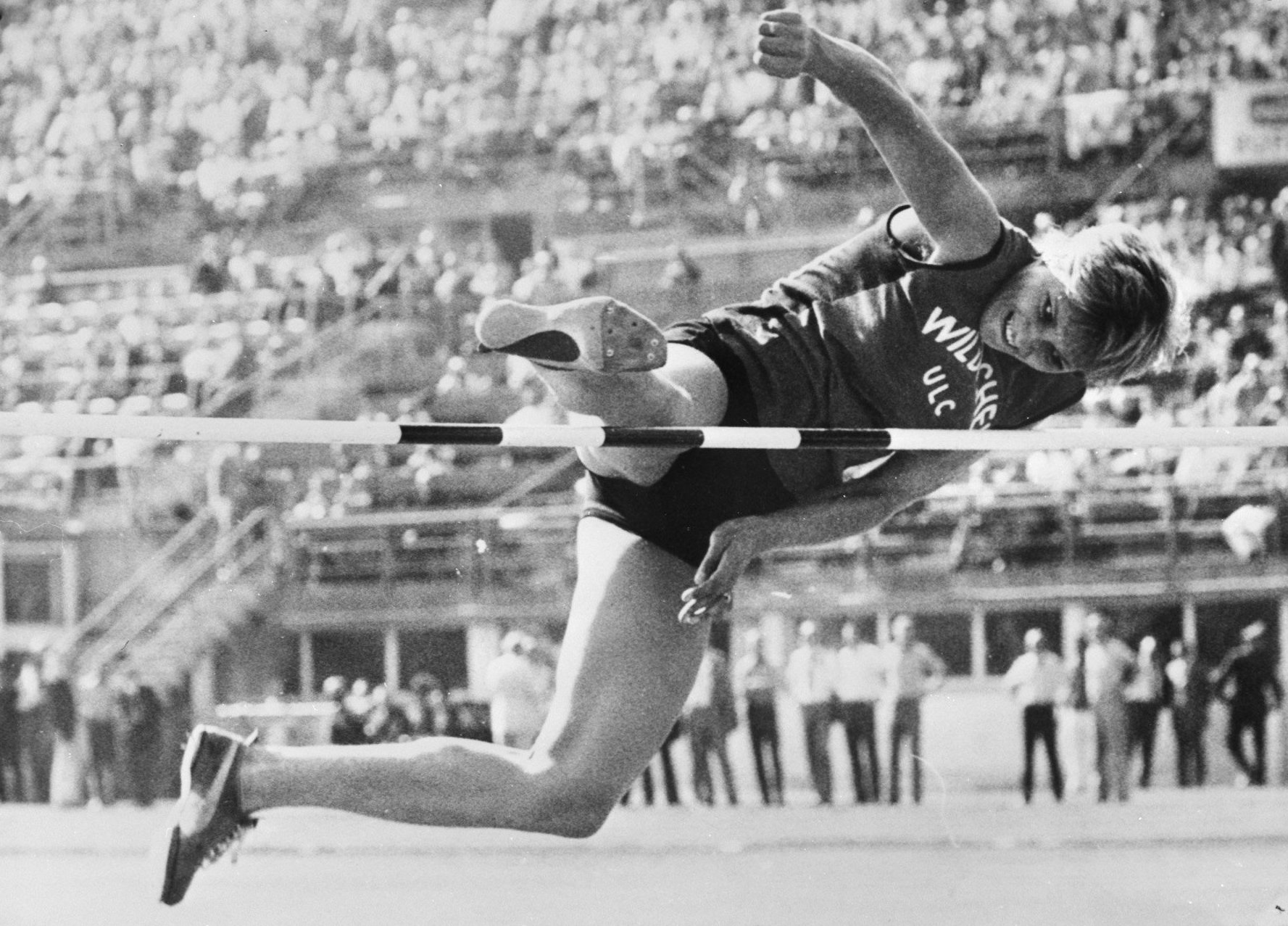 Collectie / Archief : Fotocollectie Anefo Reportage / Serie : [ onbekend ] Beschrijving : Ilona Gusenbauser (Oostenrijk) verbeterd wereldrecord hoogspringen, Wenen, in actie Annotatie : Repronegatief Datum : 6 september 1971 Locatie : Oostenrijk, Wenen Trefwoorden : HOOGSPRINGEN, wereldrecords Fotograaf : Basch, Fritz Auteursrechthebbende : Nationaal Archief Materiaalsoort : Negatief (zwart/wit) Nummer archiefinventaris : bekijk toegang 2.24.01.04 Bestanddeelnummer : 924-9093